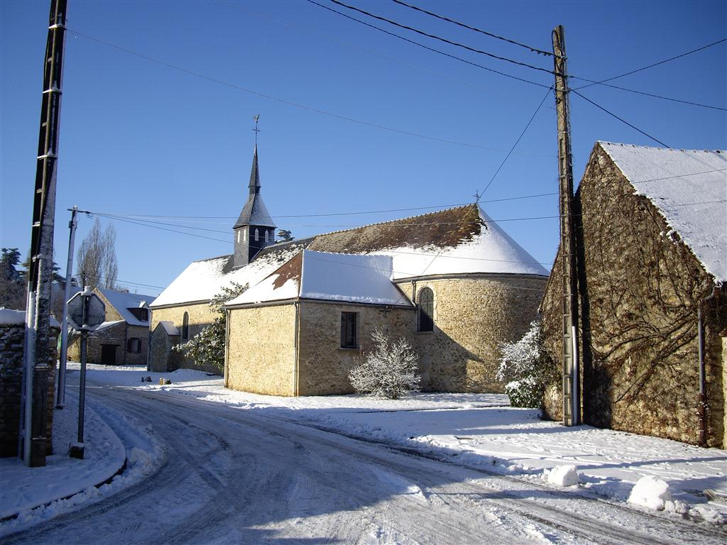 La rue du Bréau et l'église en décembre 2010.